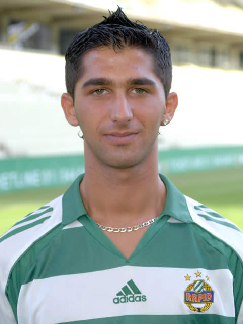 Semsudin Mehic im Rapid Wien- Dress